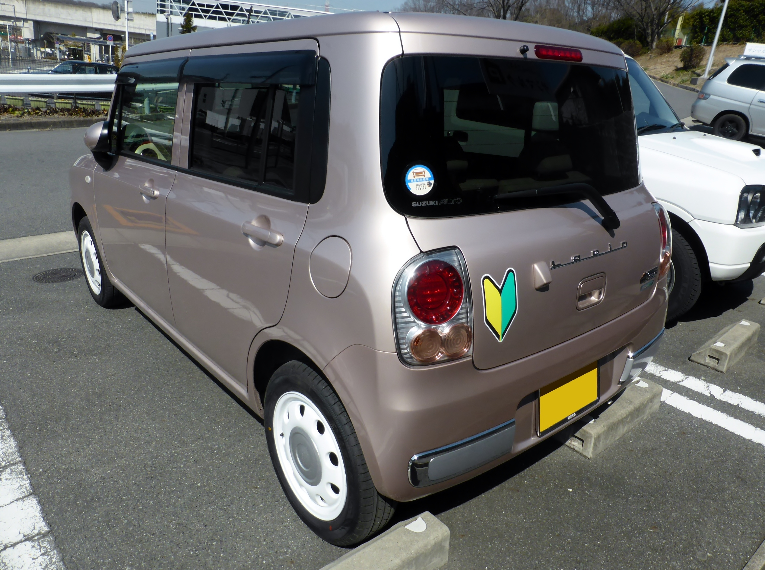 HE22S型スズキ・アルトラパンショコラをリアから撮影。